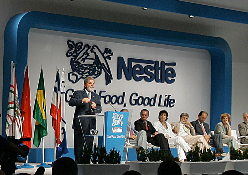 O presidente Lula da Silva discursa na inauguração da fábrica da Nestlé em Feira de Santana, na Bahia.